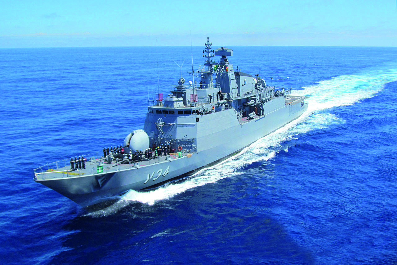 A Corveta Barroso - construída pela Marinha do Brasil